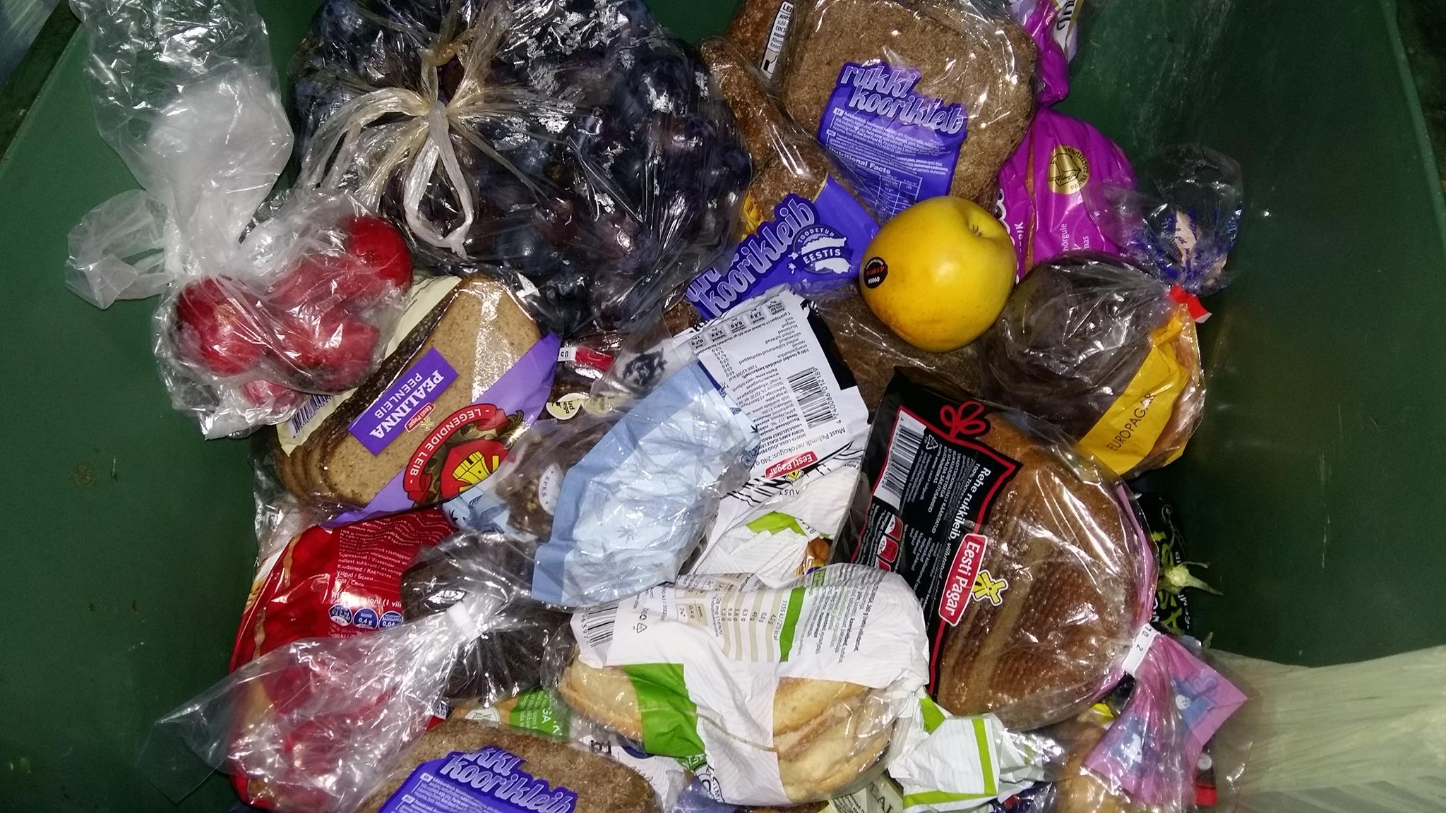 Eestis, Tallinnas toidukaupluse taga olevaa prügikasti sisu